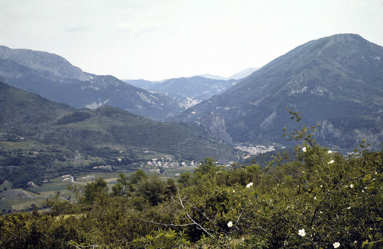 Castellane, dép Alpes-de-Haute-Provence, France